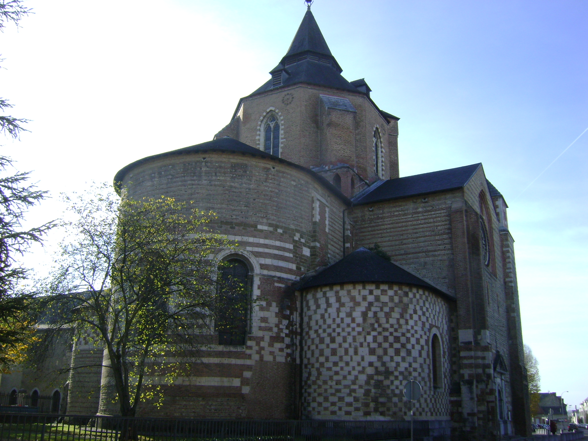 Cathédrale Notre-Dame-de-la-Sède, Tarbes, Hautes-Pyrénées. Le chevet de la cathédrale. .